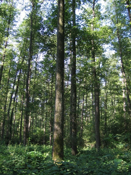 Posebni rezervat šumske vegetacije "Crni jarki".